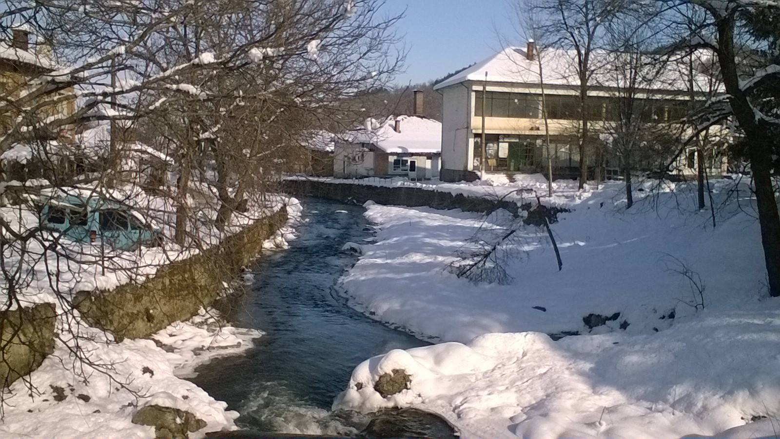 Река Златица